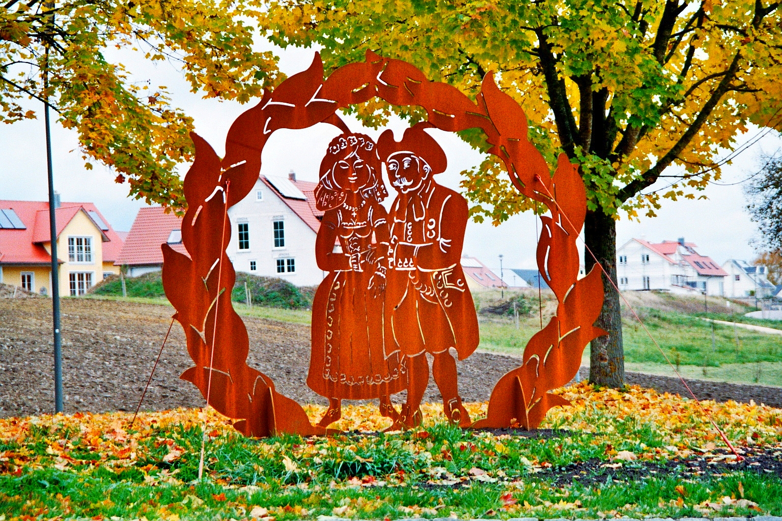 Metallsilhouette im Kreisverkehr von Ehekirchen, Landkreis Neuburg-Schrobenhausen, Bayern, Deutschland. Das am 4. September 2010 enthüllte Kunstwerk, welches von Franz Männling kreiert wurde, soll auf die Ehekirchener Bierhochzeit hinweisen.